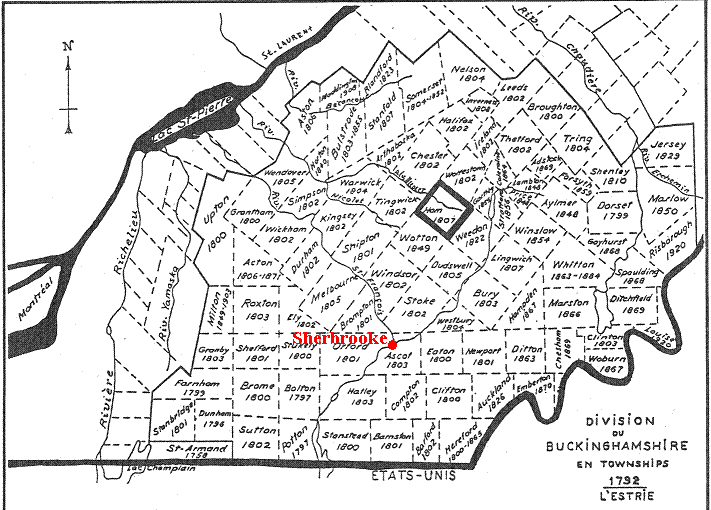 Sherbrooke dans la division du Buckinghamshire en Townships en 1792.